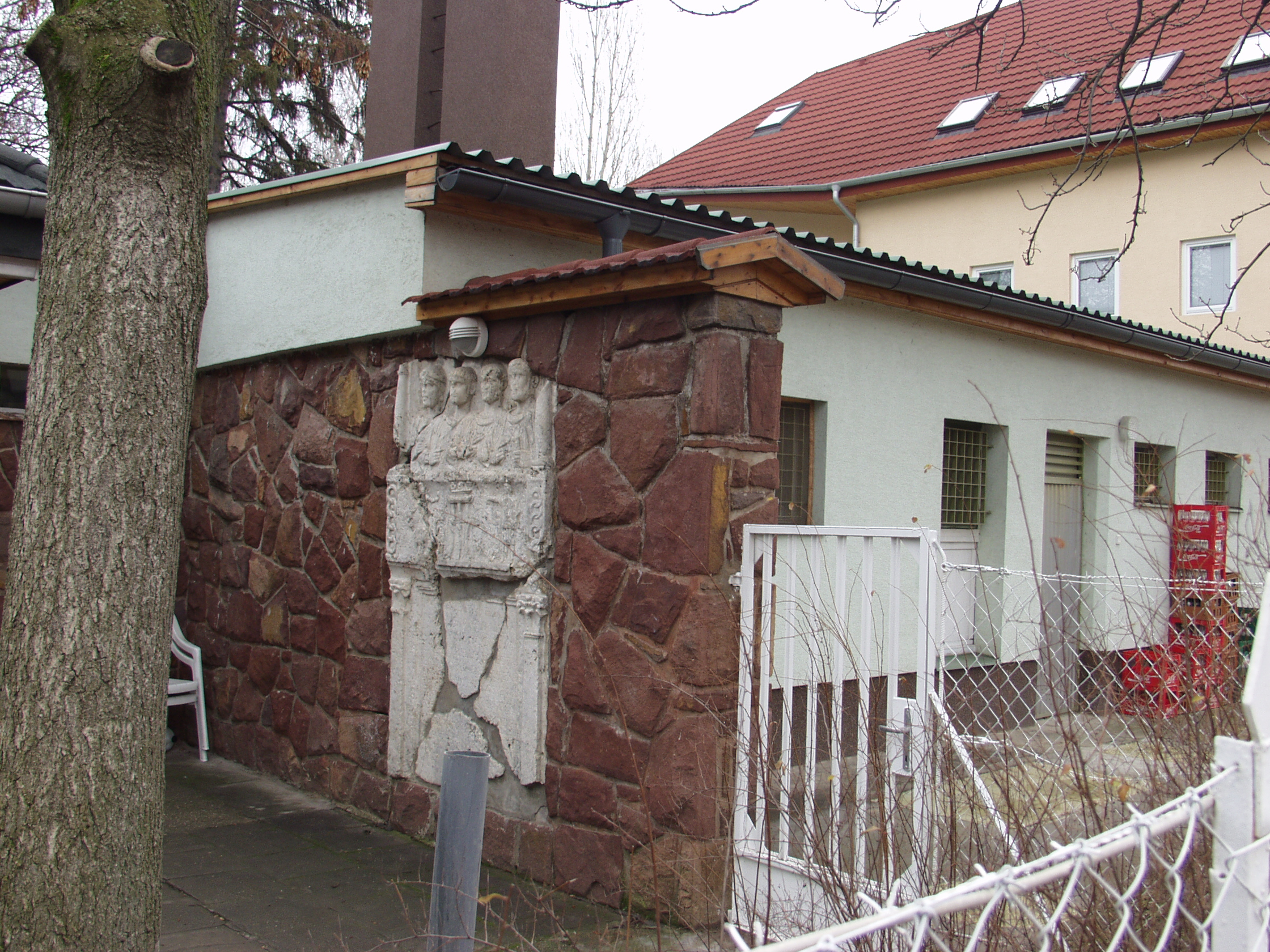 Aurelius Respectus síremléke, Balatonszemes, Árnyas fasor 1.